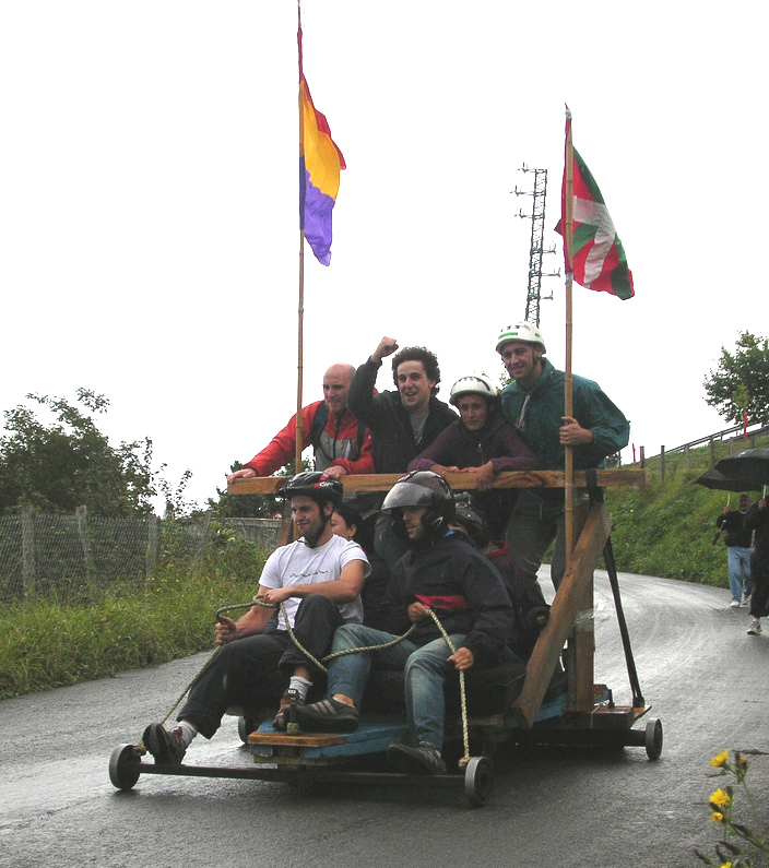 Goitibehera bat.